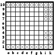 Пример короткого фронта в "Войне вирусов".